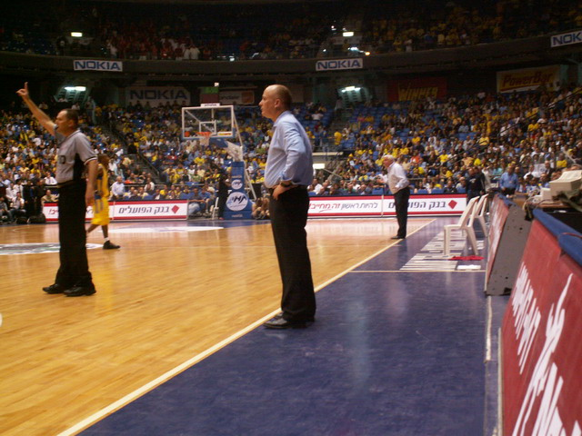 ארז אדלשטיין, היה המאמן של הפועל י"ם בעונת 2005/6